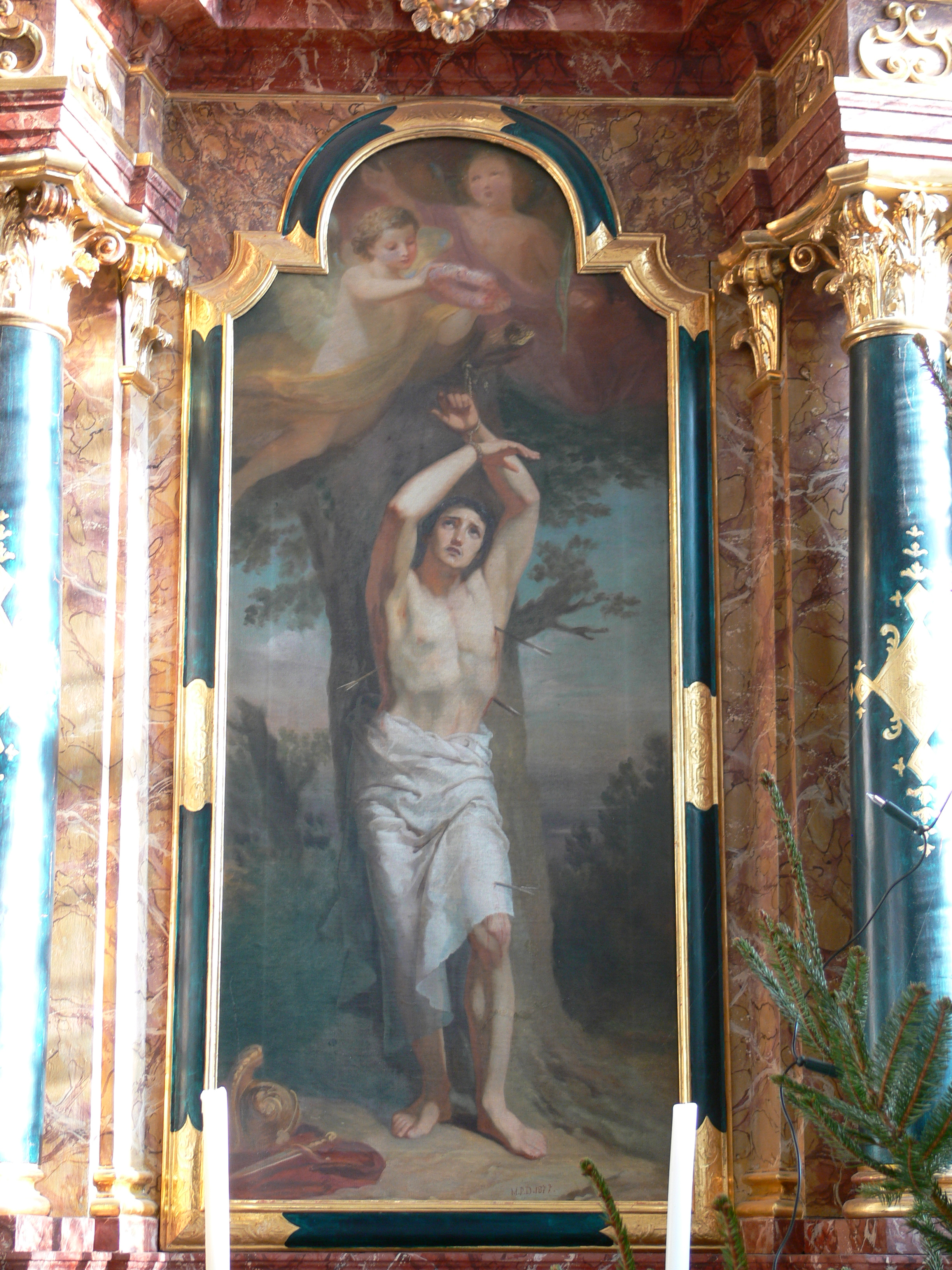 Ittendorf (Ortsteil von Markdorf), Bodenseekreis, Baden-Württemberg Pfarrkirche St. Martin, erbaut um 1660–1680 Gemälde "Hl. Sebastian", 1877; Altarblatt des rechten Seitenaltars